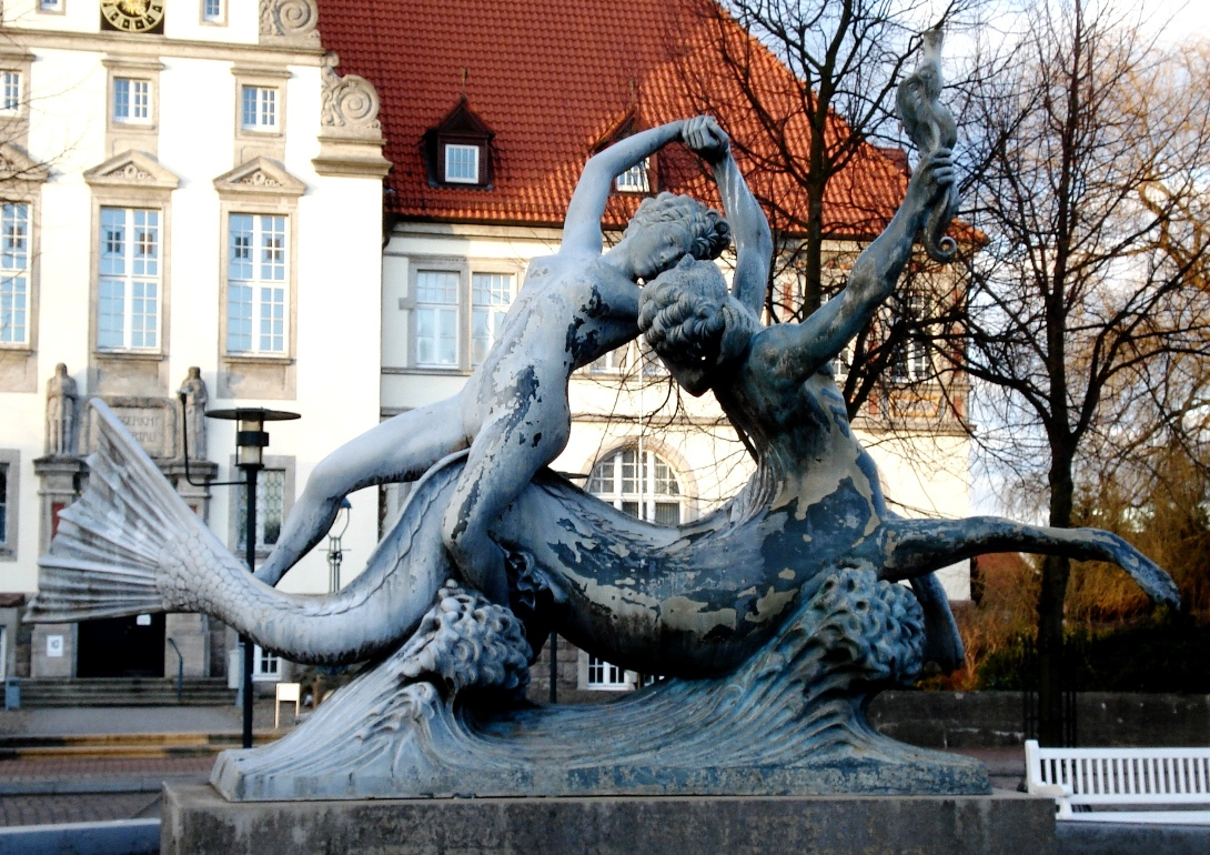 Brunnenplastik "Im-Spiel-der-Wellen" in Bad Schwartau, erstmals gegossen 1907, 1943 für Rüstung requiriert, 1986 nachgeformt, 1997 neu gegossen und aufgestellt